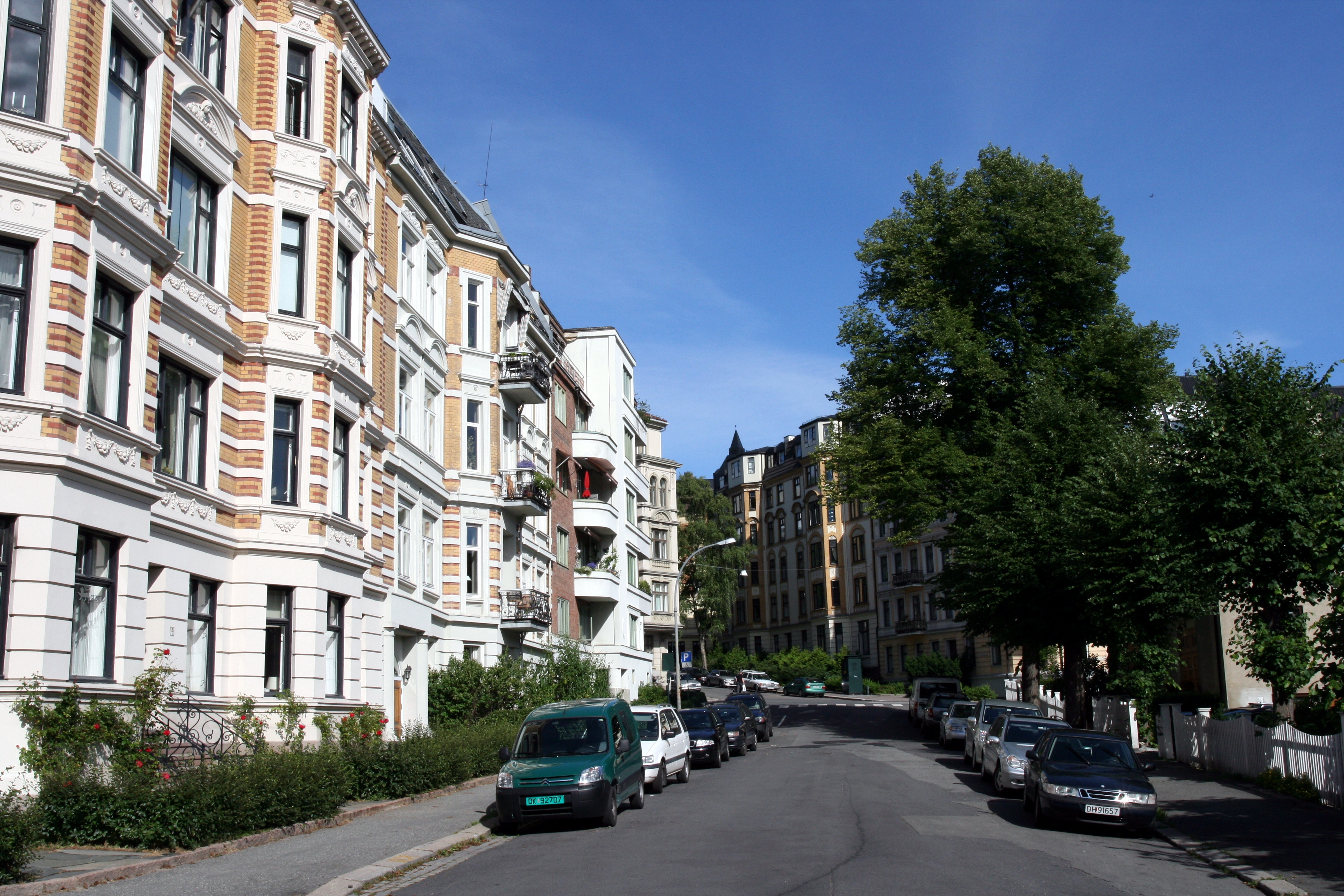 Starten på Elisenbergveien på Frogner i Oslo.